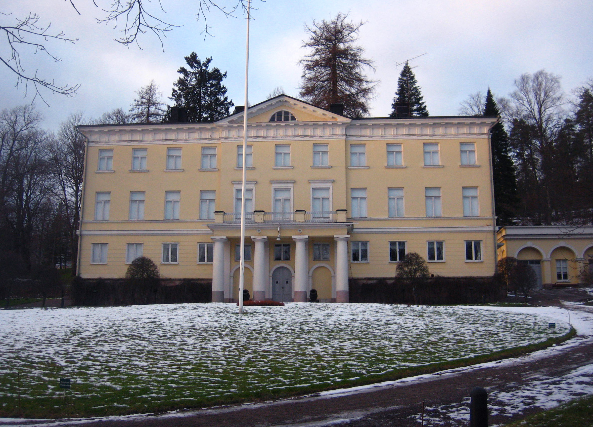 Fiskarsin Kivimuuri Raaseporissa on rakennettu vuosina 1816–1822.